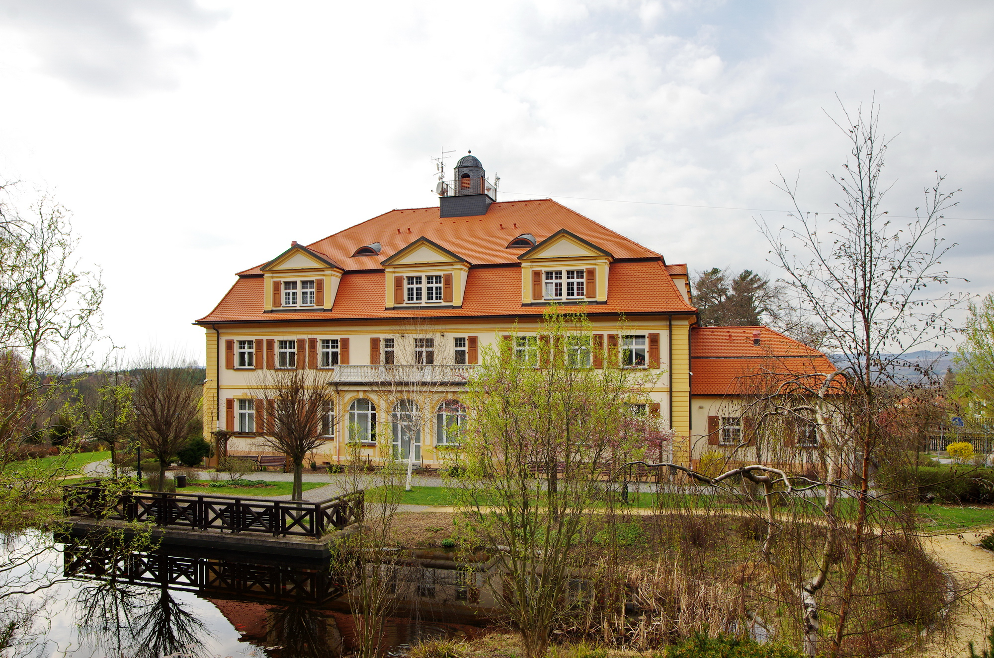 Královské Poříčí, zámeček Seebohmova vila, okres Sokolov